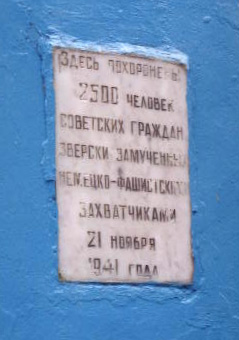 Надпись на памятнике евреям поселка Козловщина Дятловского района Гродненской области, убитым нацистами в 1941 году.